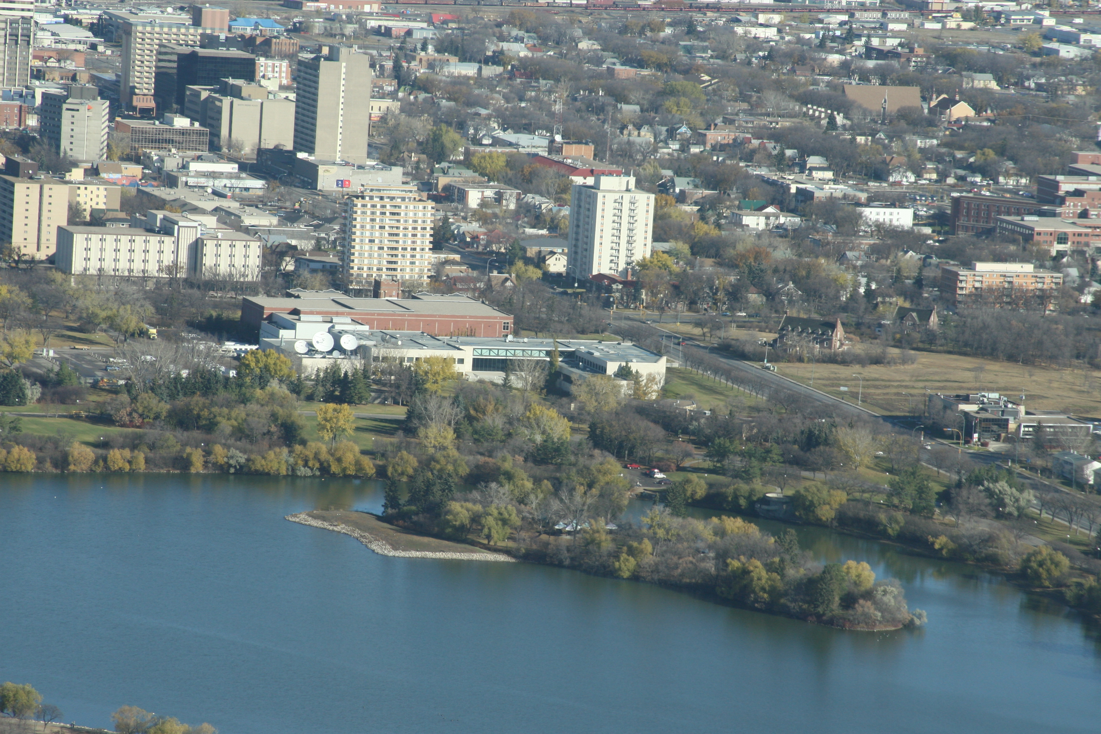 Radio-Canada/CBC Building